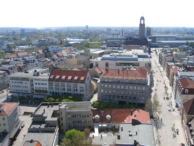 Blick vom Turm der St. Nikolai-Kirche Richtung Süden zum Rathaus.